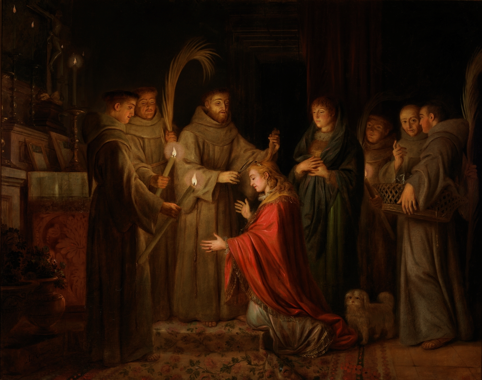 La obra representa a San Francisco de Asís, el fundador de la Orden de los franciscanos, cortándole el cabello a Santa Clara de Asís.